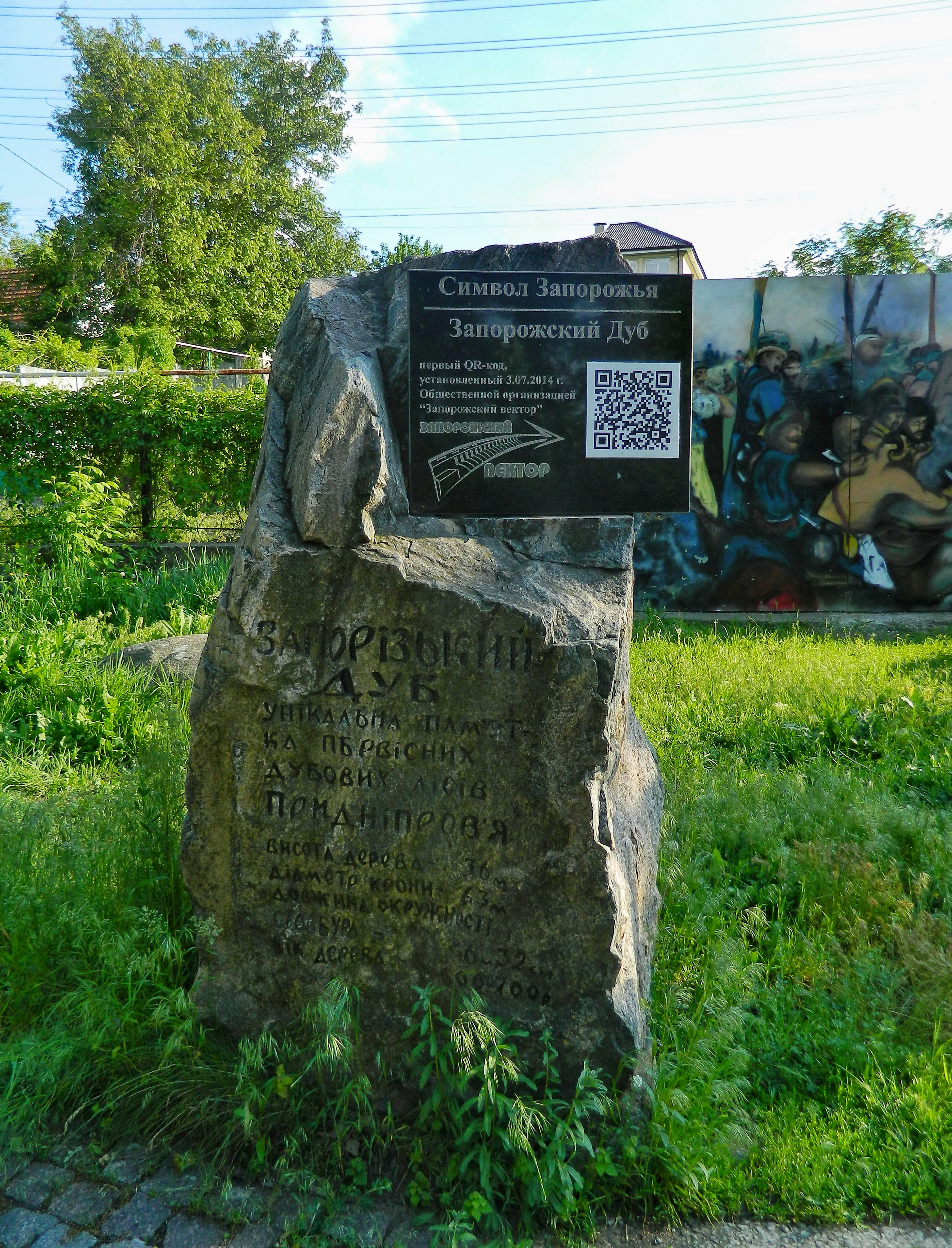 «Запорозький 700-річний дуб», м.Запоріжжя